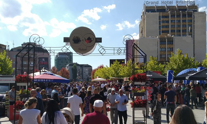 Coffee and Tea Festival - Prishtine